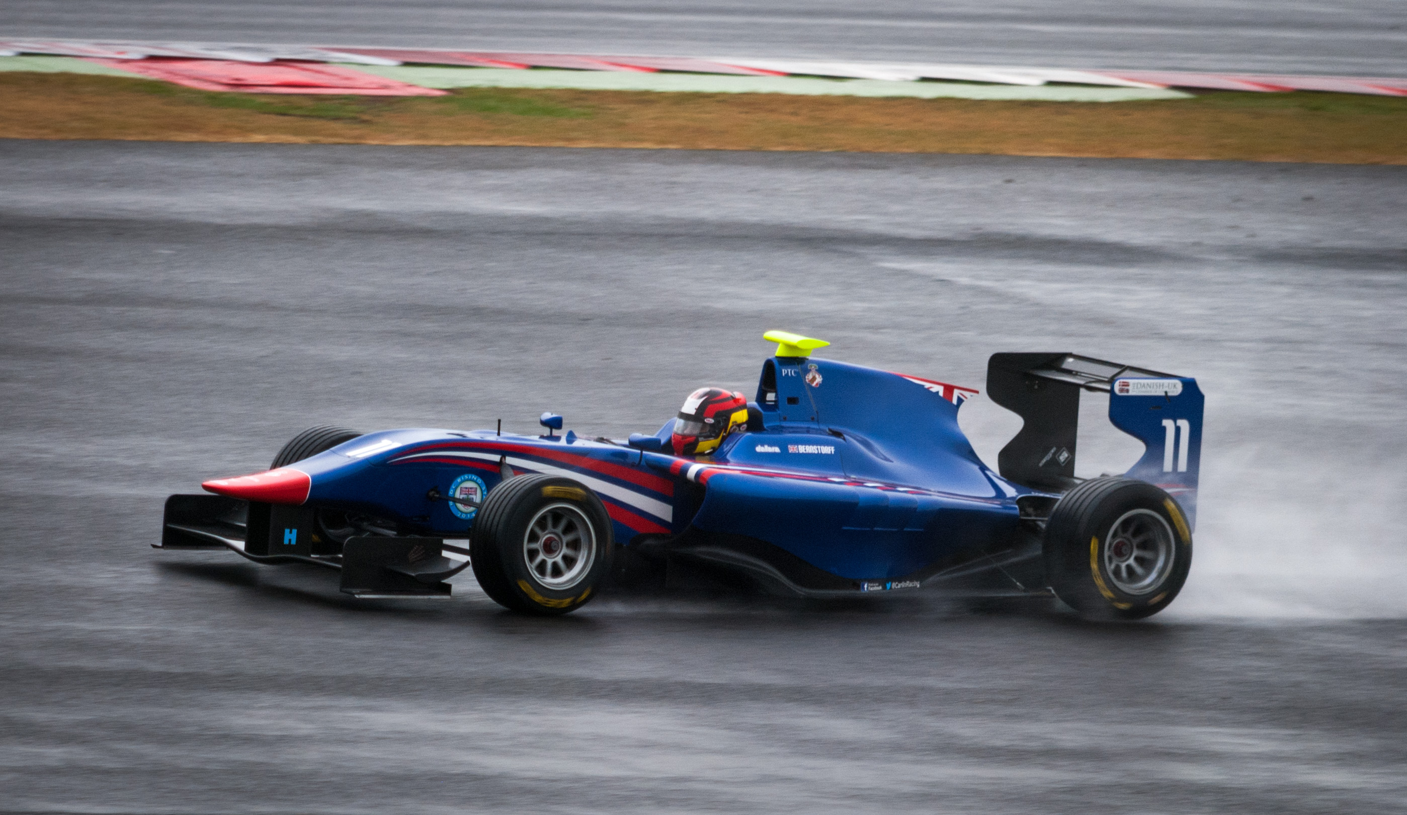 GP3 - Carlin - Emil Bernstorff